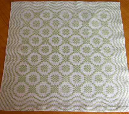 Duk i daldräll (Doroteadräll). Se även Daldräll i olika inslagstäthet